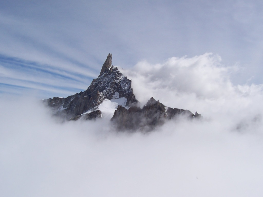 Dente del Gigante This is a photo of a monument which is part of cultural heritage of Italy.